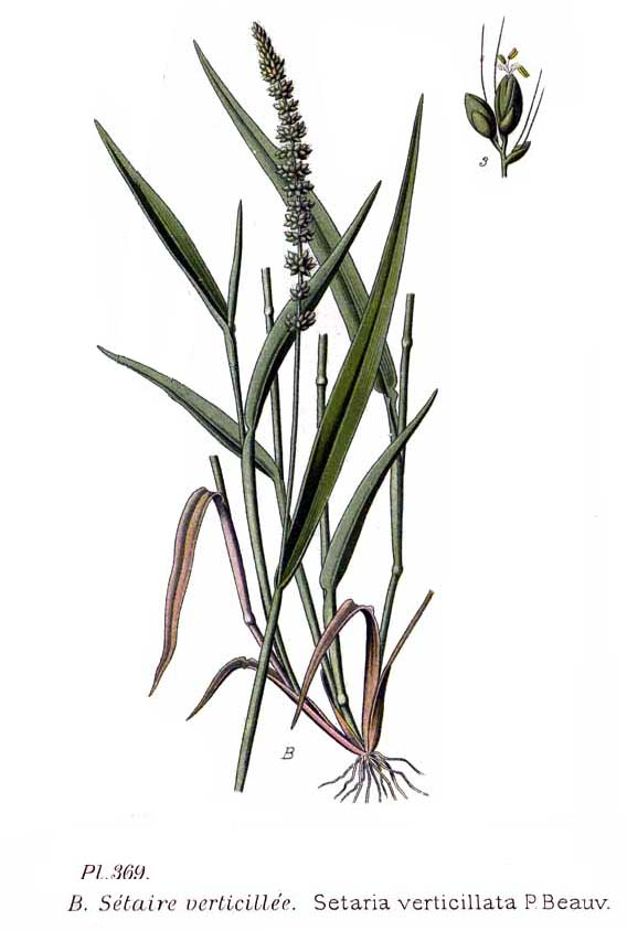 Setaria verticillata P.Beauv.